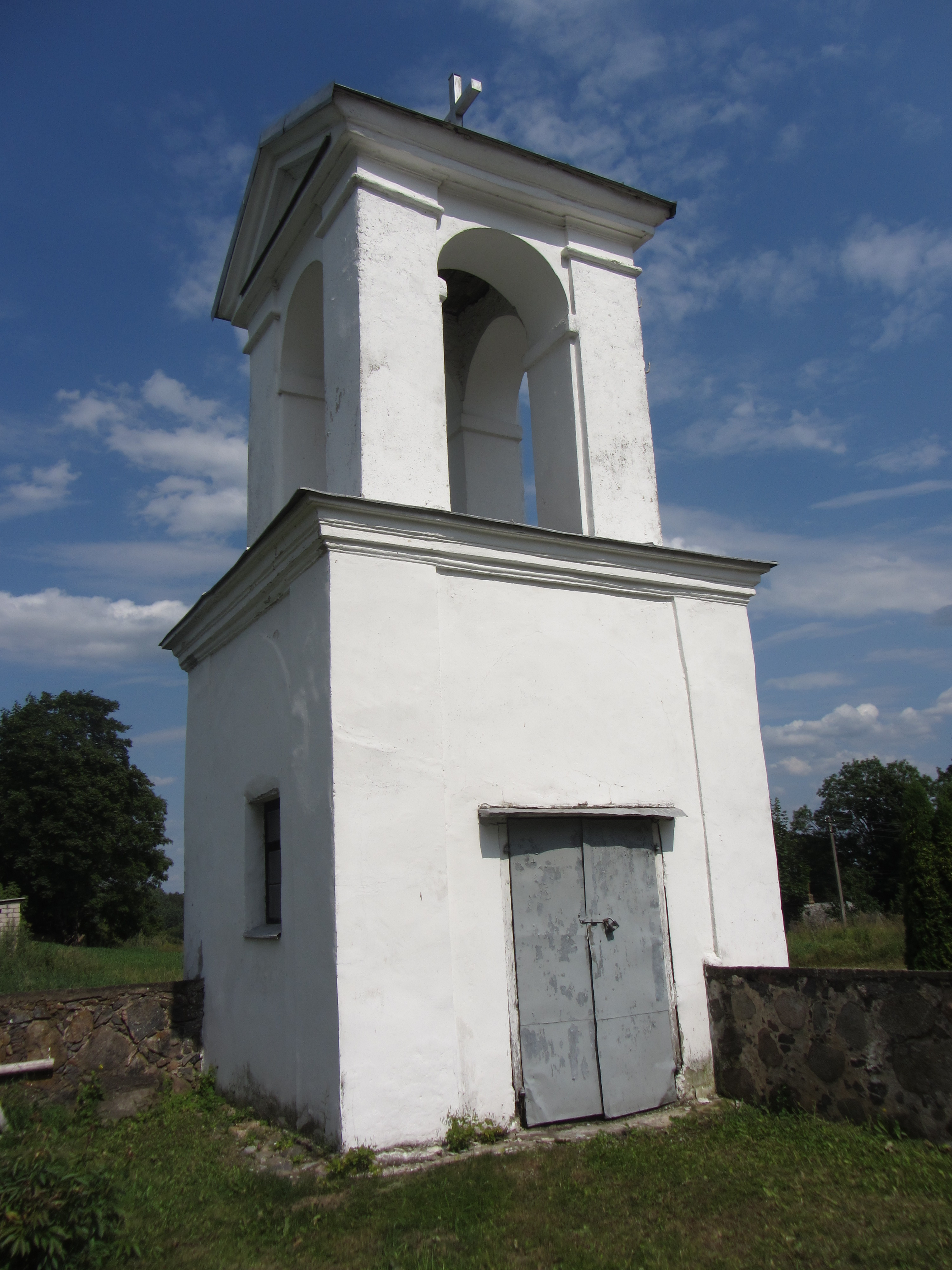 Aleksandravėlė, Lithuania